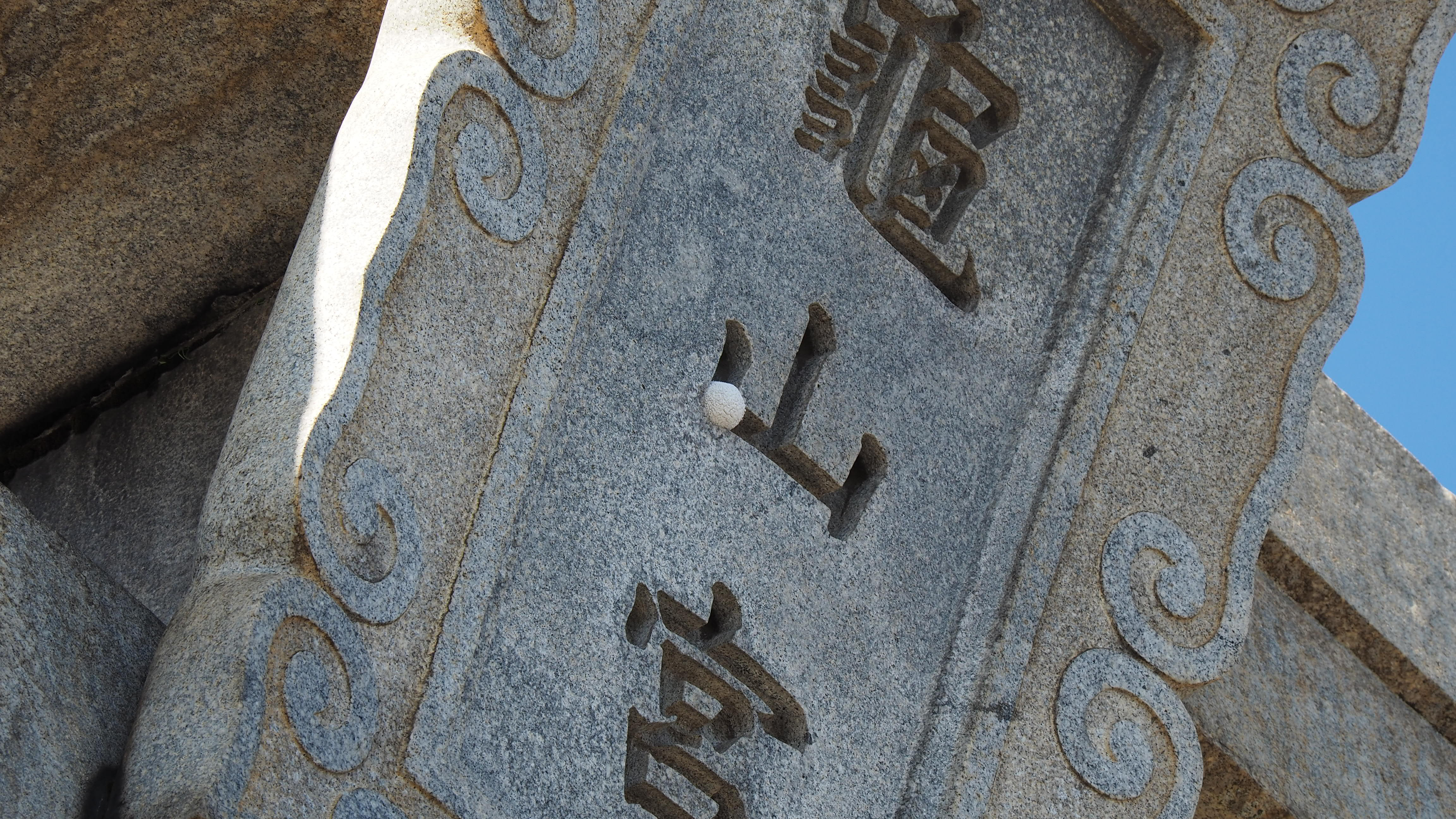 亀山八幡宮(下関市)大鳥居の神額(2019年8月撮影)